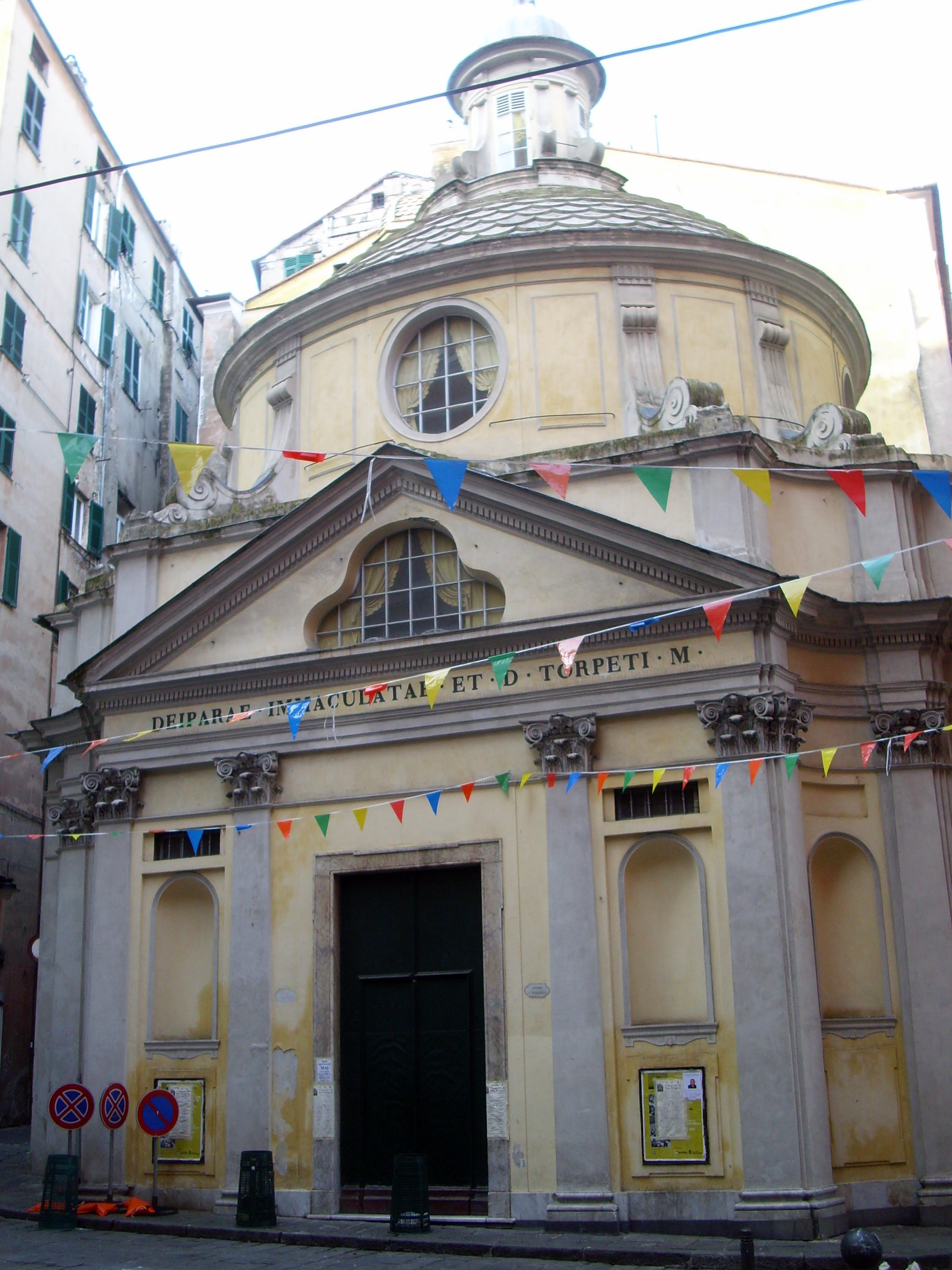 La chiesa di San Torpete a Genova.